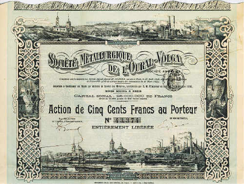 Societe Metallurgique de l`Oural-Volga S.A. Alte historische Aktien und Wertpapiere